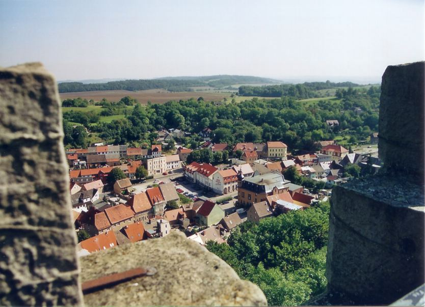 Eckartsberga - Blick von der Eckhartsburg auf die Stadt